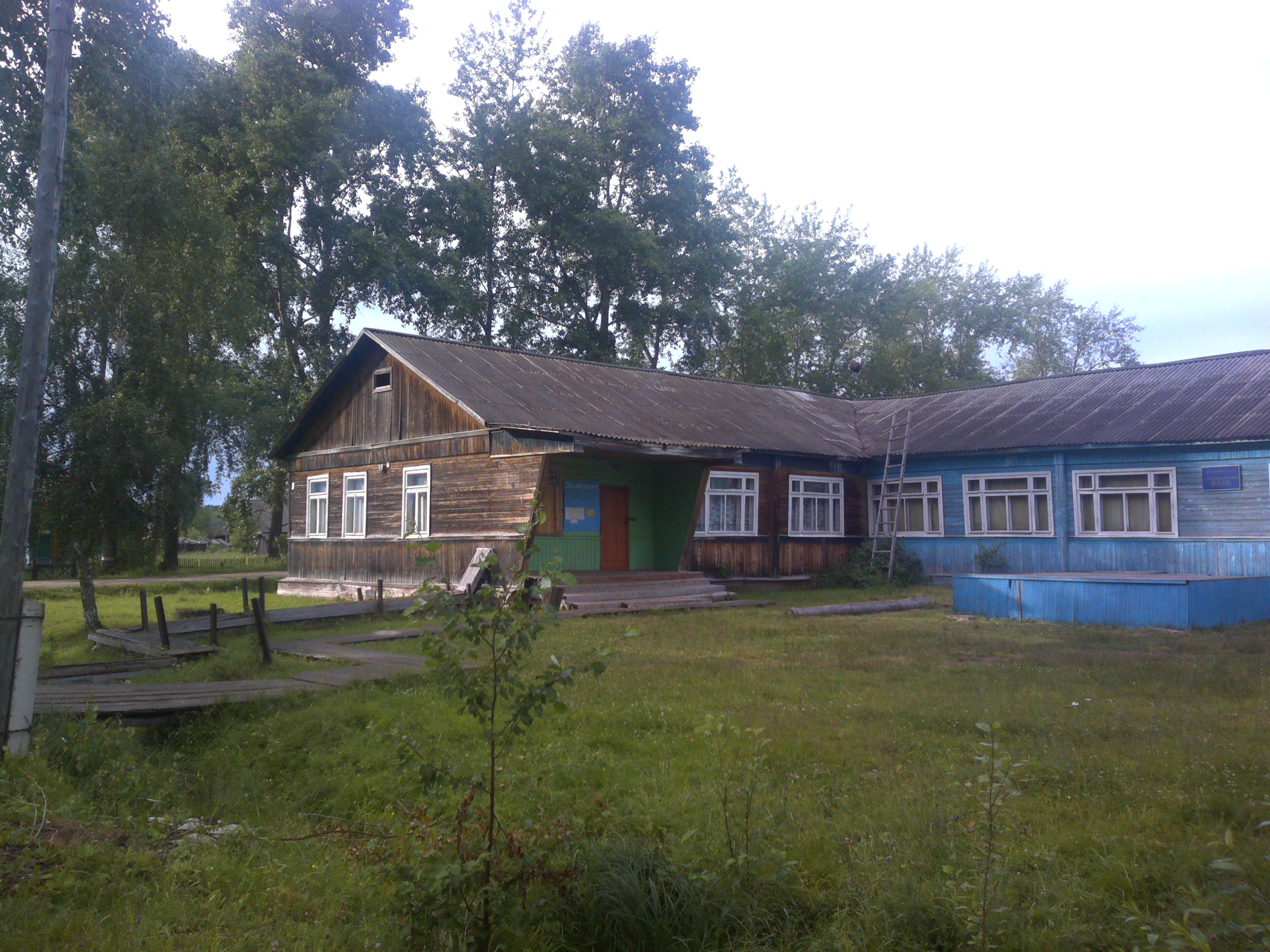 Нюбская УЖД, посёлок Харитоново